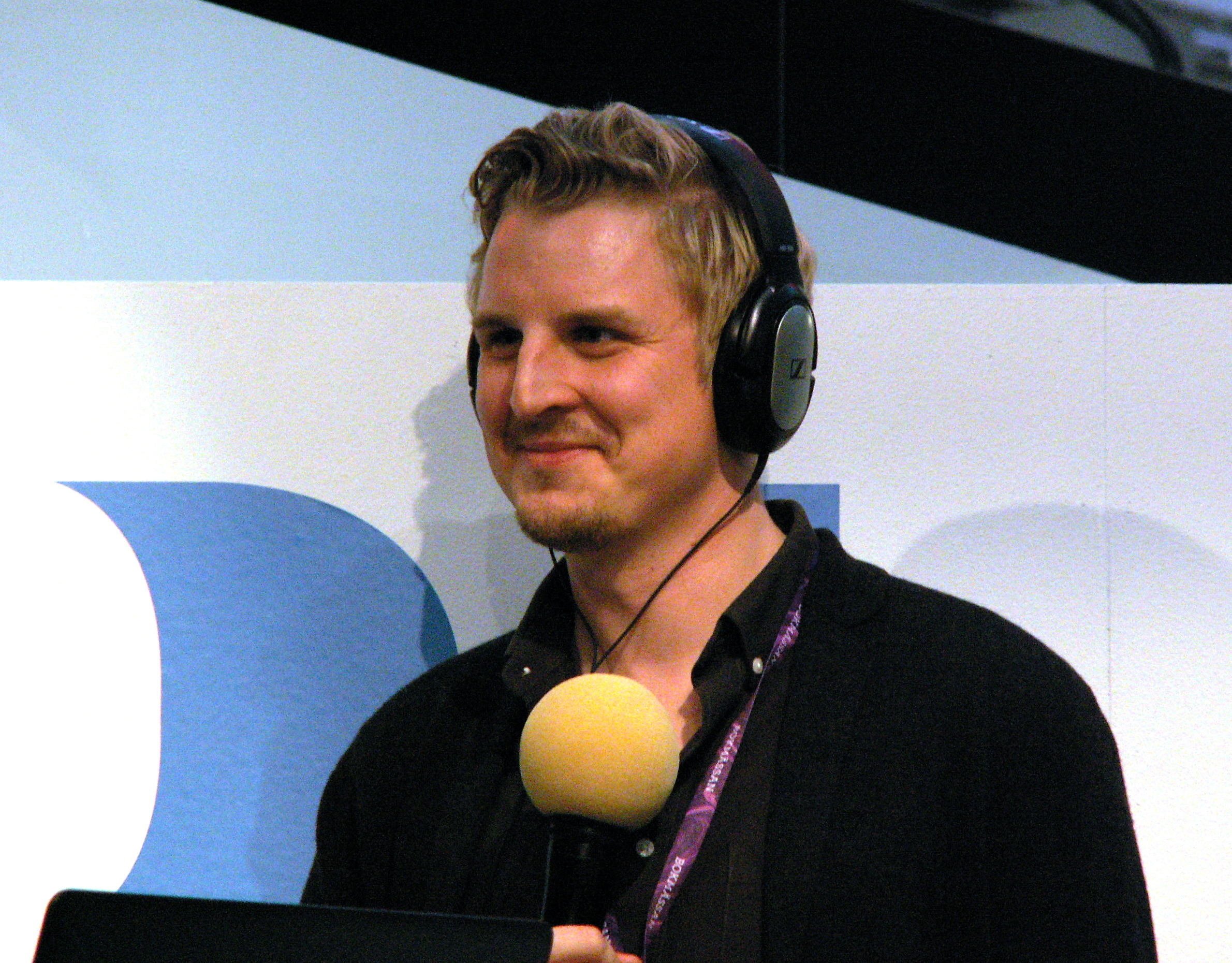 Sveriges Radio – Dagliga nyhetspoddar, Bokmässan 2018. Mark Malmström (SR Ekot).